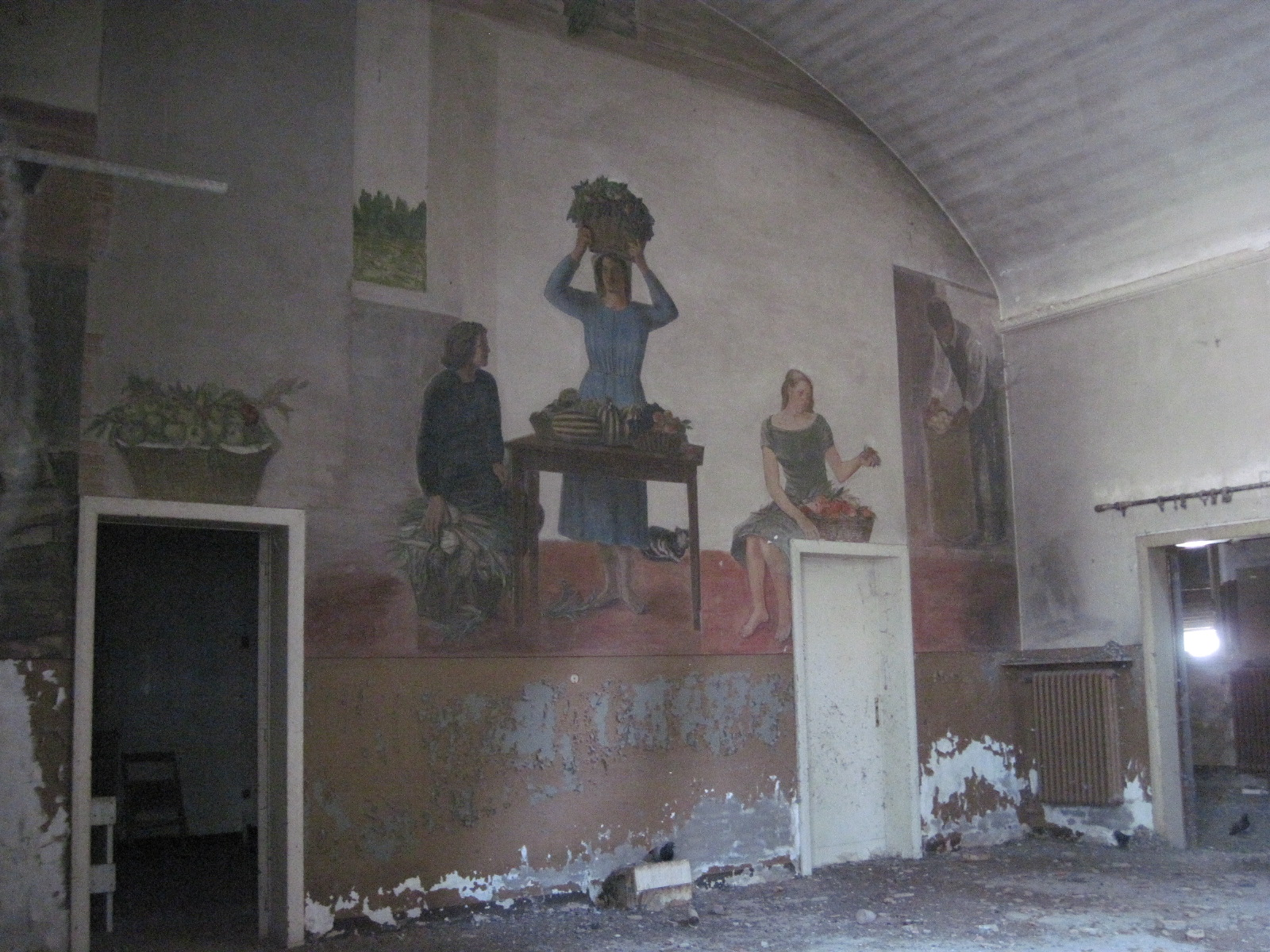 Ex Mercato Ortofrutticolo (M.O.F.) di Ferrara - Salone centrale del piano rialzato - Affreschi di Galileo Cattabriga